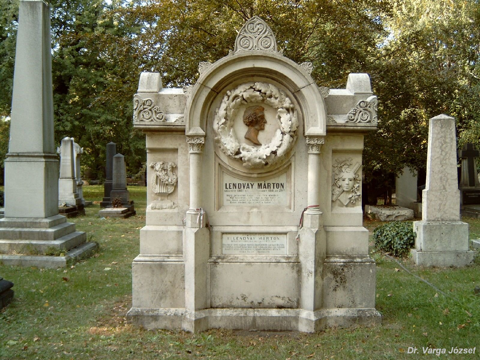 Id. Lendvay Márton (Nagybánya, 1807. nov. 11. – Pest, 1858. jan. 29.) és fia, ifj. Lendvay Márton (Kolozsvár, 1830. szept. 14. – Bp., 1875. júl. 12.) drámai színészek sírja Budapesten. Kerepesi temető: 34/1-2-19 [kivitelező: Gerenday-cég, építész: Feszl Frigyes, szobrász: Dunaiszky László].